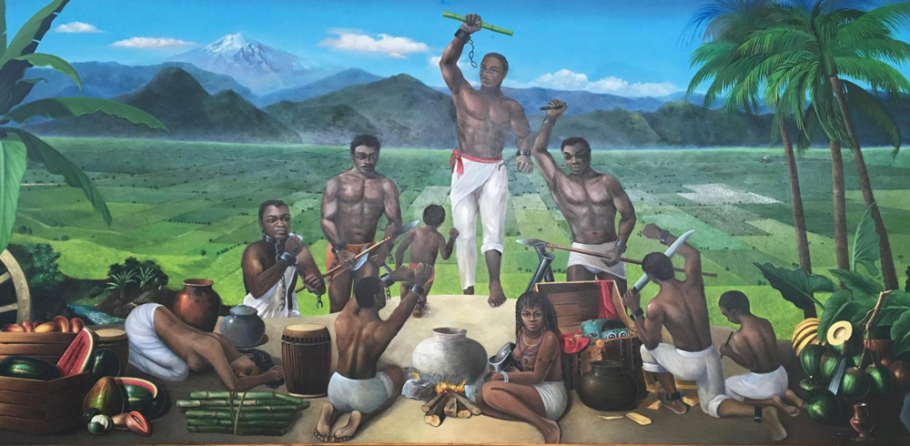 Pintura en el Museo Regional de Palmillas, en Yanga, Veracruz